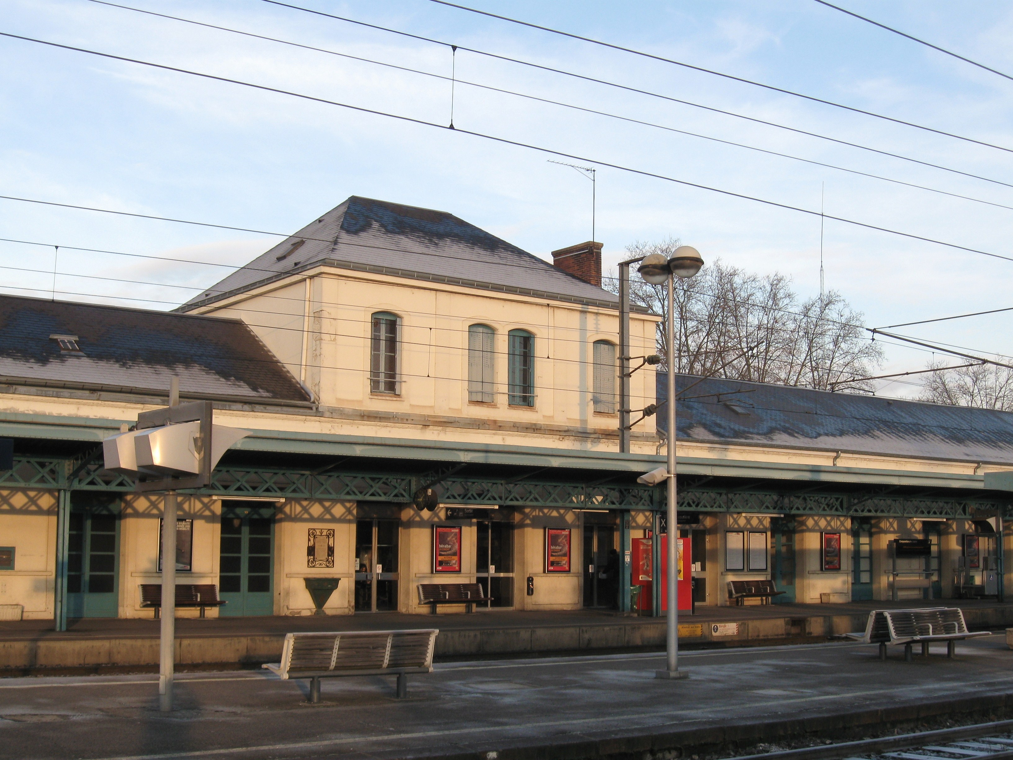 Gare de Moulins, Allier, France